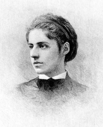 Engraving